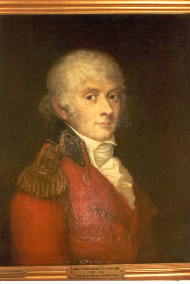 Pintura al óleo de Louis Le Normand de Bretteville